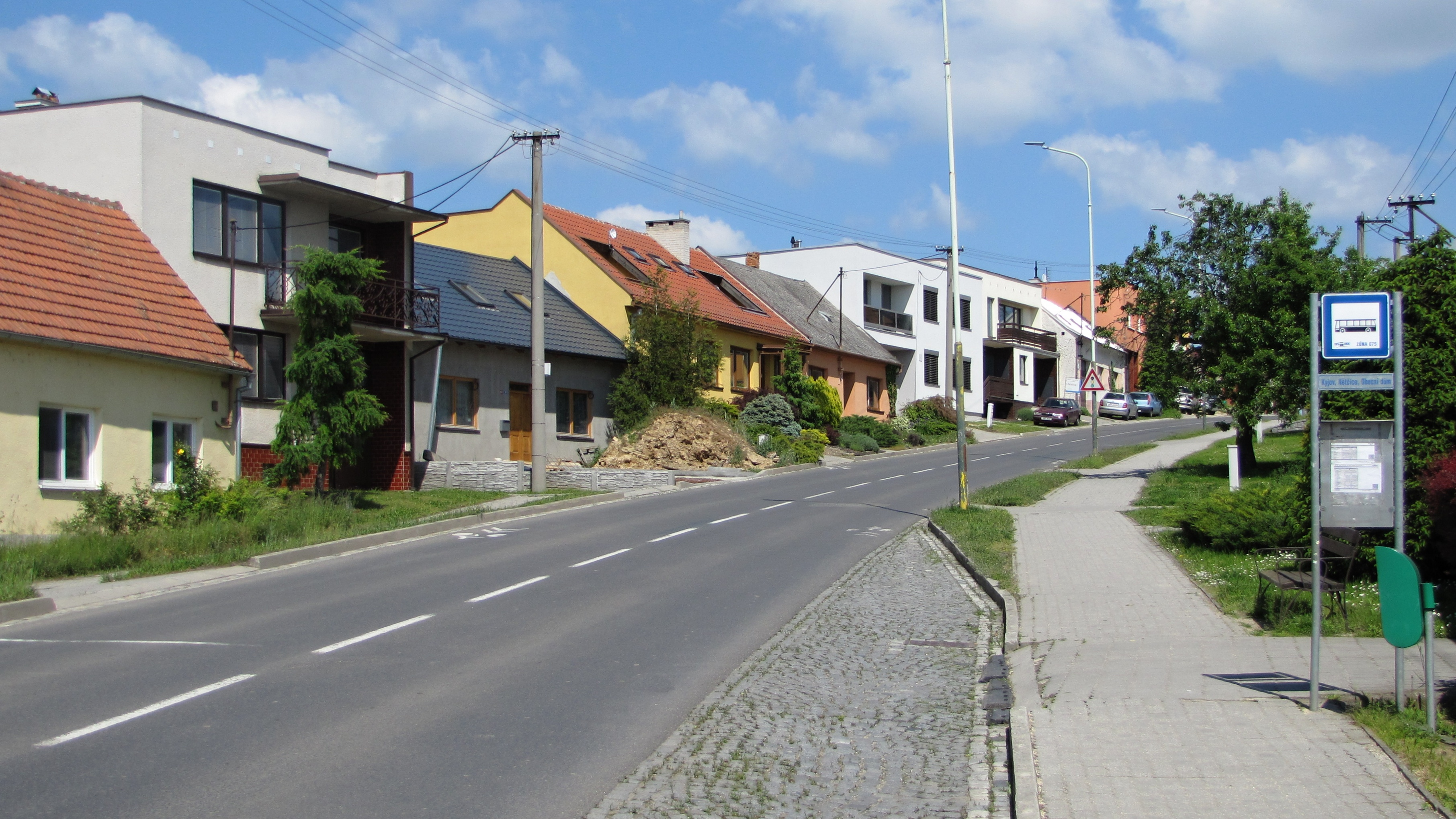 Nětčická ulice v Kyjově